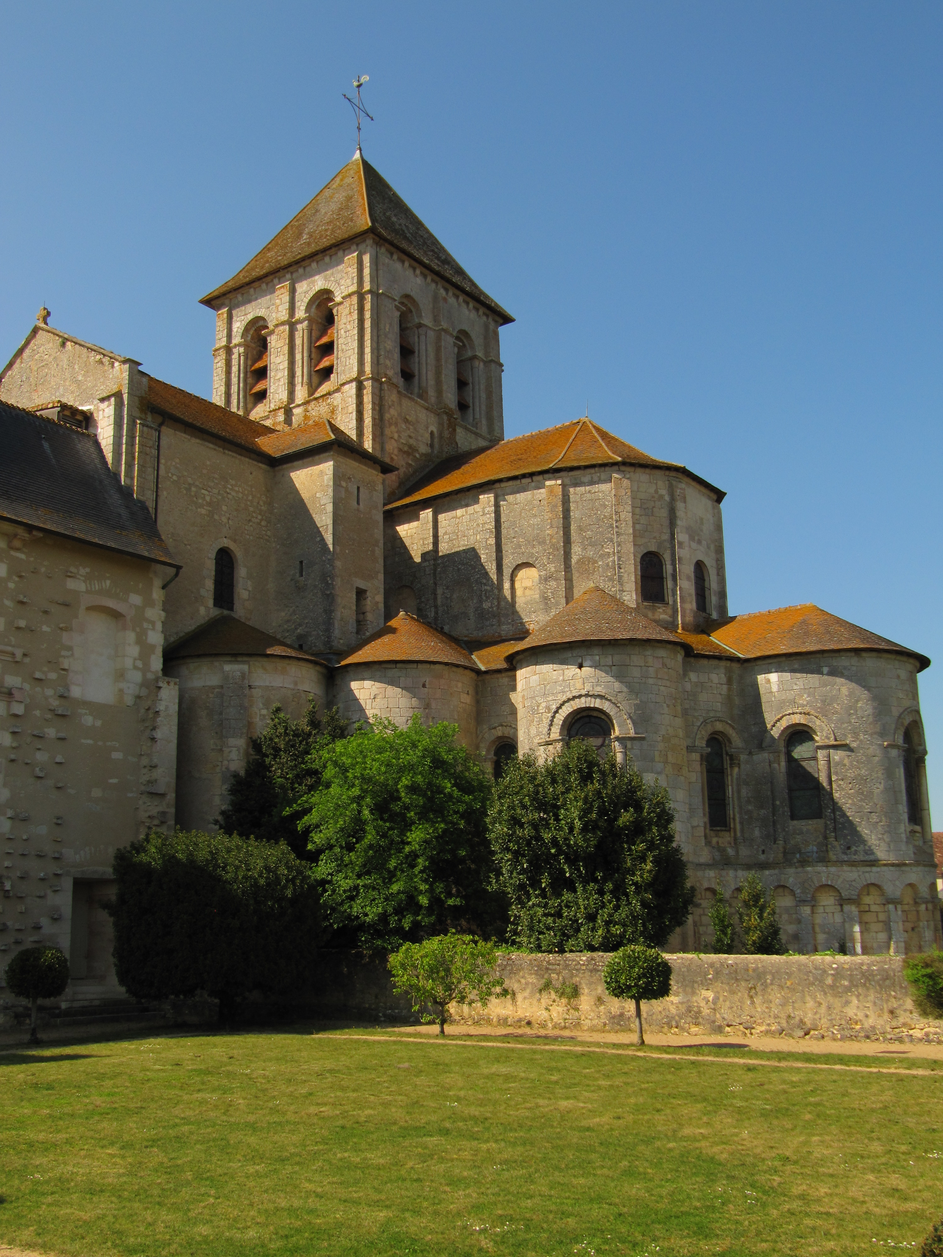 Saint Savin sur Gartempes